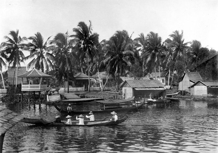 Repronegatief. Prauwen passeren elkaar in de Kali Djoewana, residentie Rembang